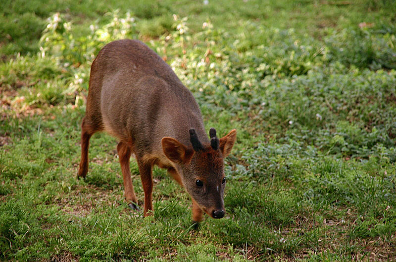 Photo d'un poudou au Jardin des Plantes à Paris